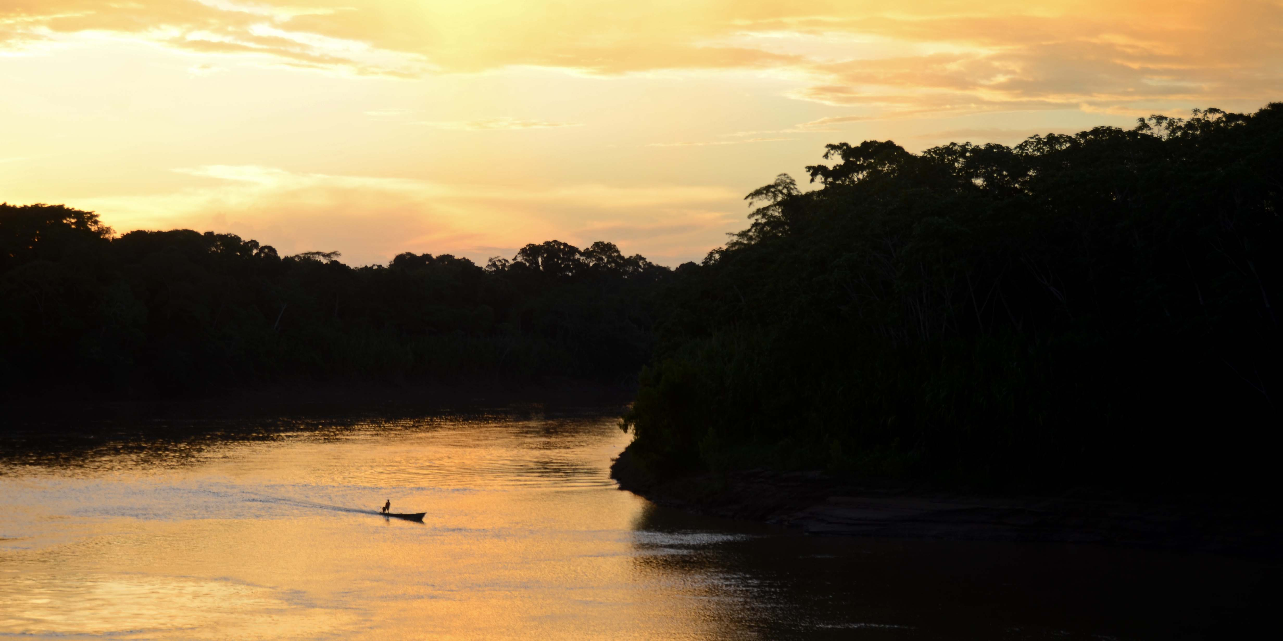 Madre de Dios, Peru